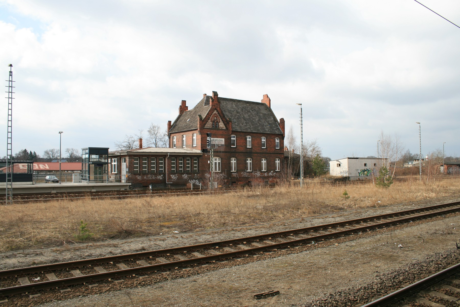 Land Brandenburg; Landkreis Havelland. Rathenow, Städtebahn Bahnhof . Baudenkmal: Bahnhof der Städtebahn